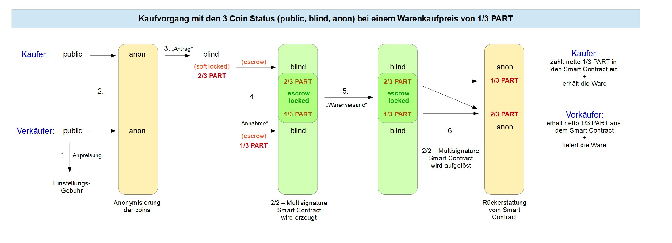 Diese Datei beschreibt einen typischen Zahlungsablauf beim Einkauf auf dem Particl Marketplace nach dem MAD Escrow Verfahren.